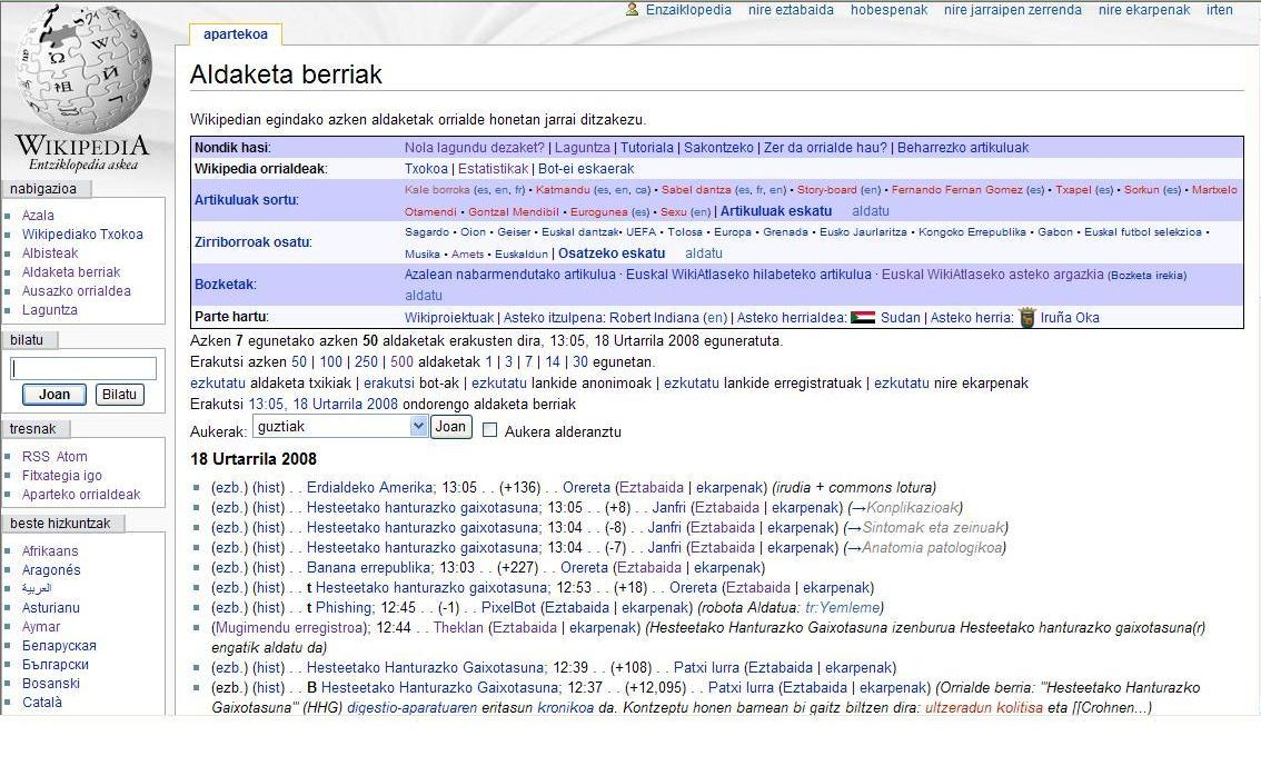 Euskarazko wikipediako aldaketa berriak 18/01/2008 14:15